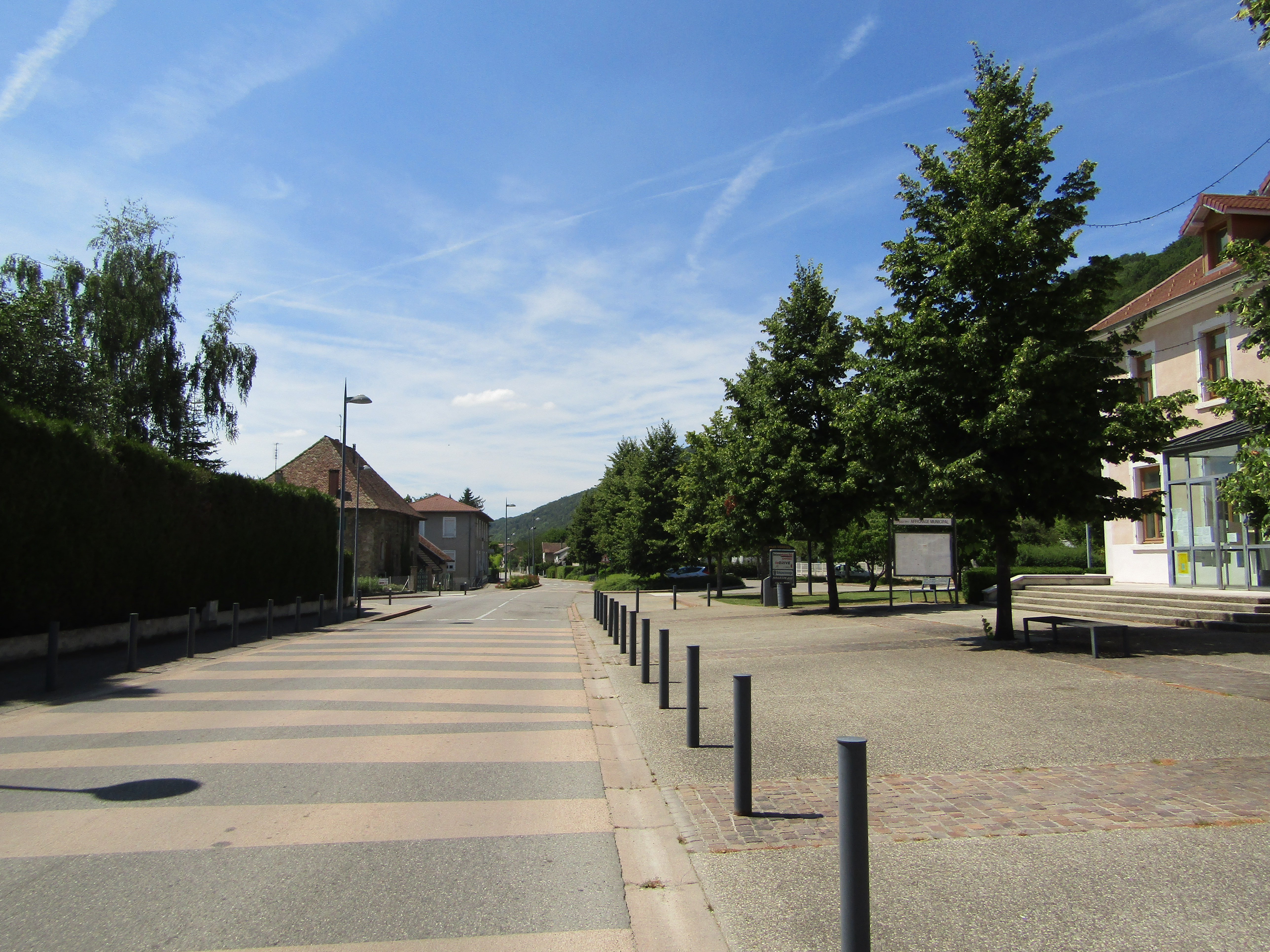 Grande route d'Apprieu